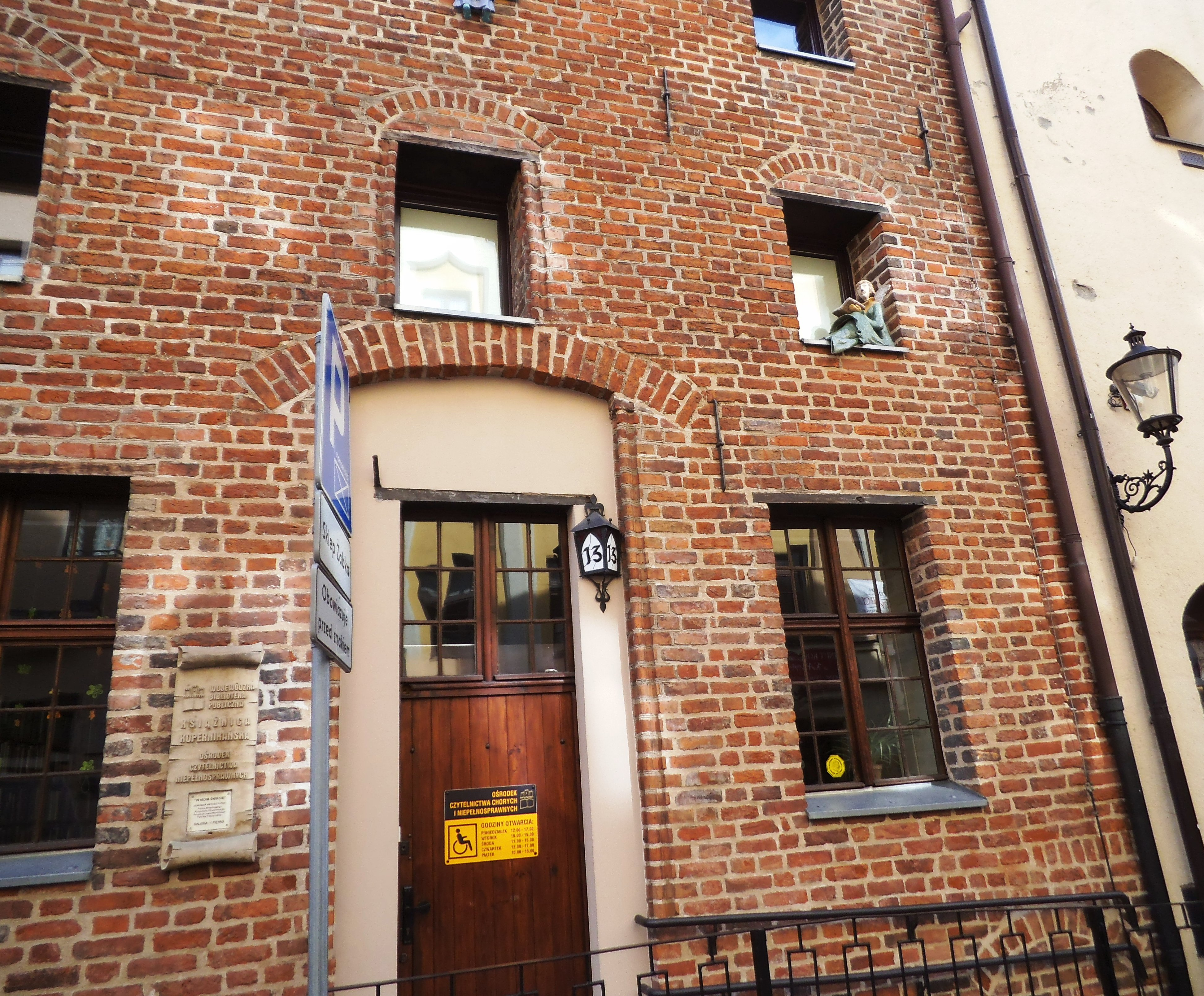 Ośrodek Czytelnictwa Chorych i Niepełnosprawnych w Toruniu1